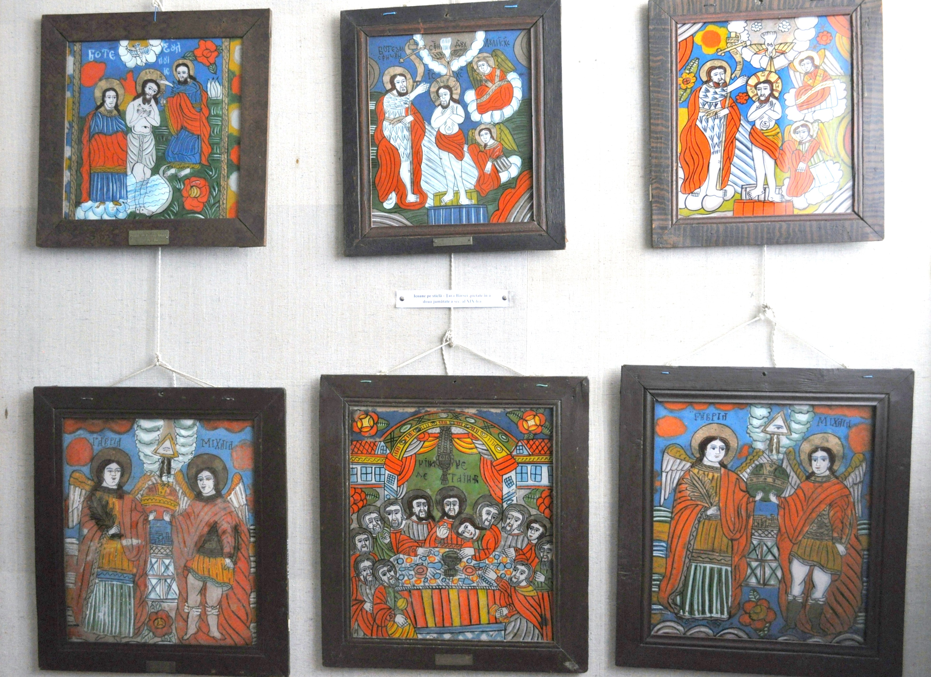 Muzeul de icoane pe sticlă „Pr.Zosim Oancea” din Sibiel